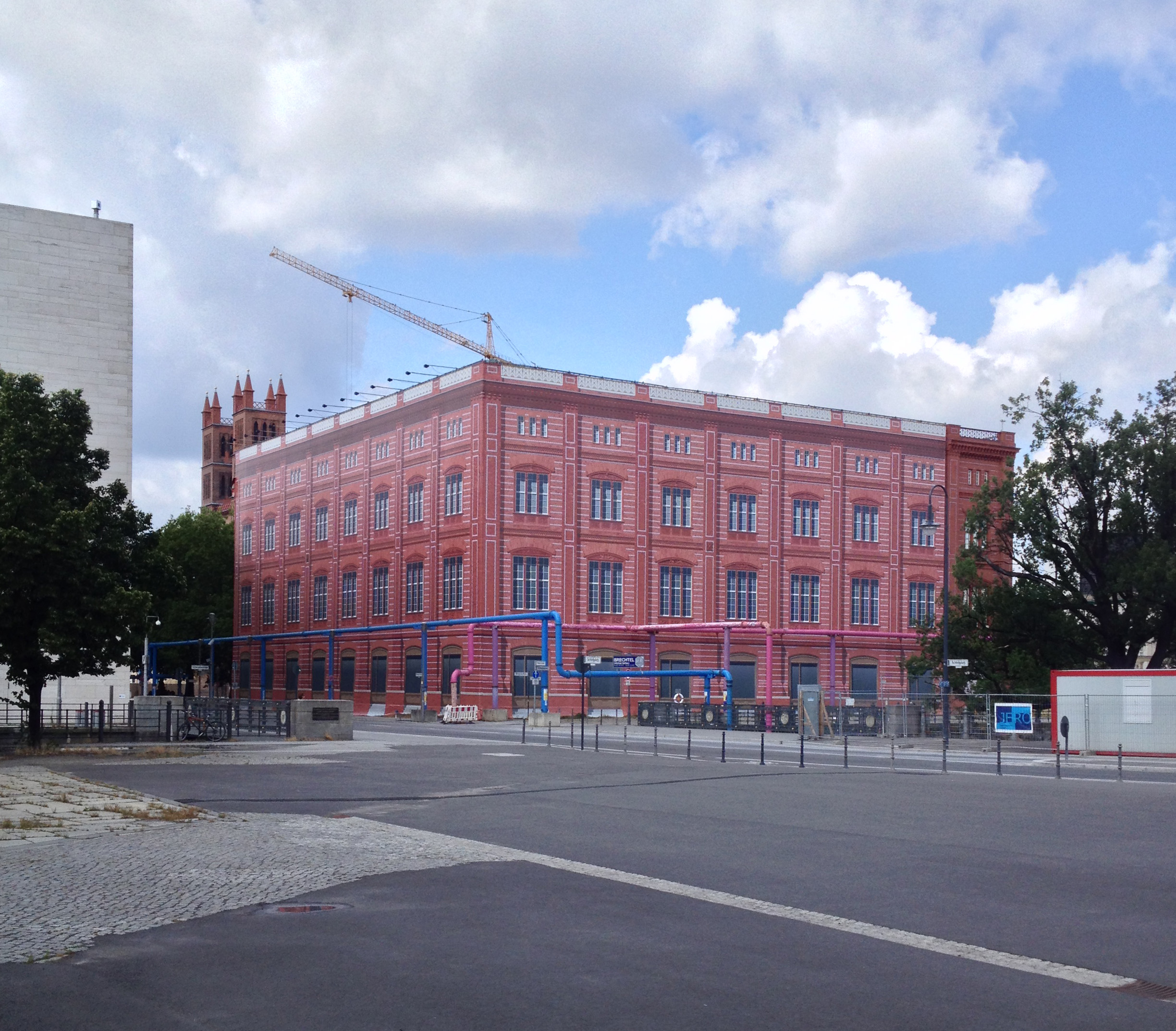 Musterfassade der Schinkelschen Bauakademie in Berlin am Werderschen Markt.